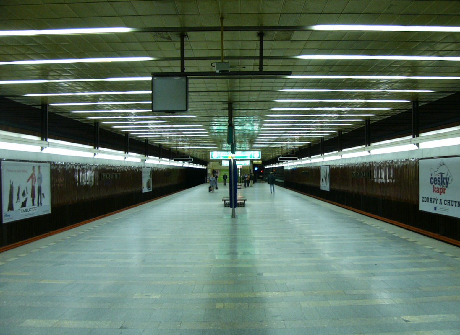 Metro station Strašnická in Prague - Stanice pražského metra Strašnická